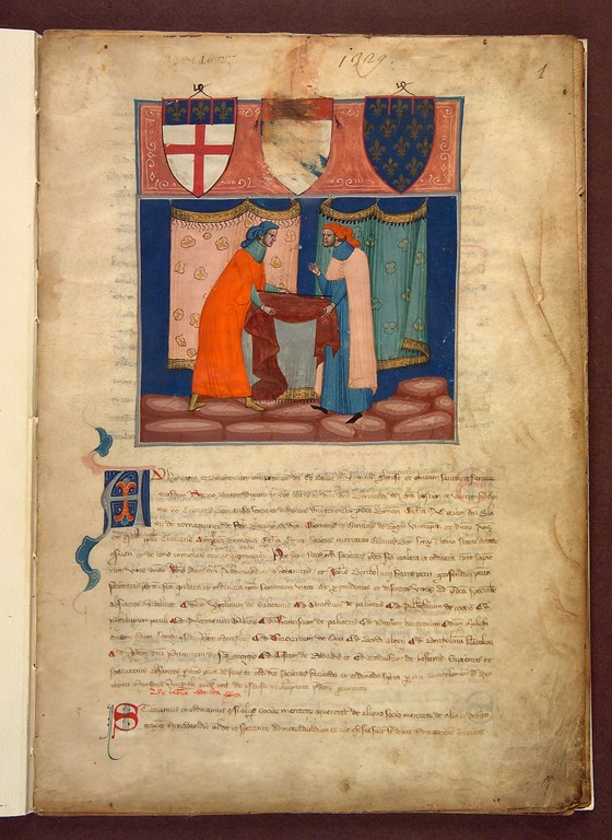 Miniatura di una scena di commercio con due personaggi impegnati in una vivace trattativa. Sono abbigliati alla moda e uno di loro ha nella mano lo strumento di misurazione del panno che entrambi reggono con le mani, 1329 (AS Bologna, Comune, Capitano del Popolo, Società d'arti e d'armi, Fondo Codici miniati, n. 9)